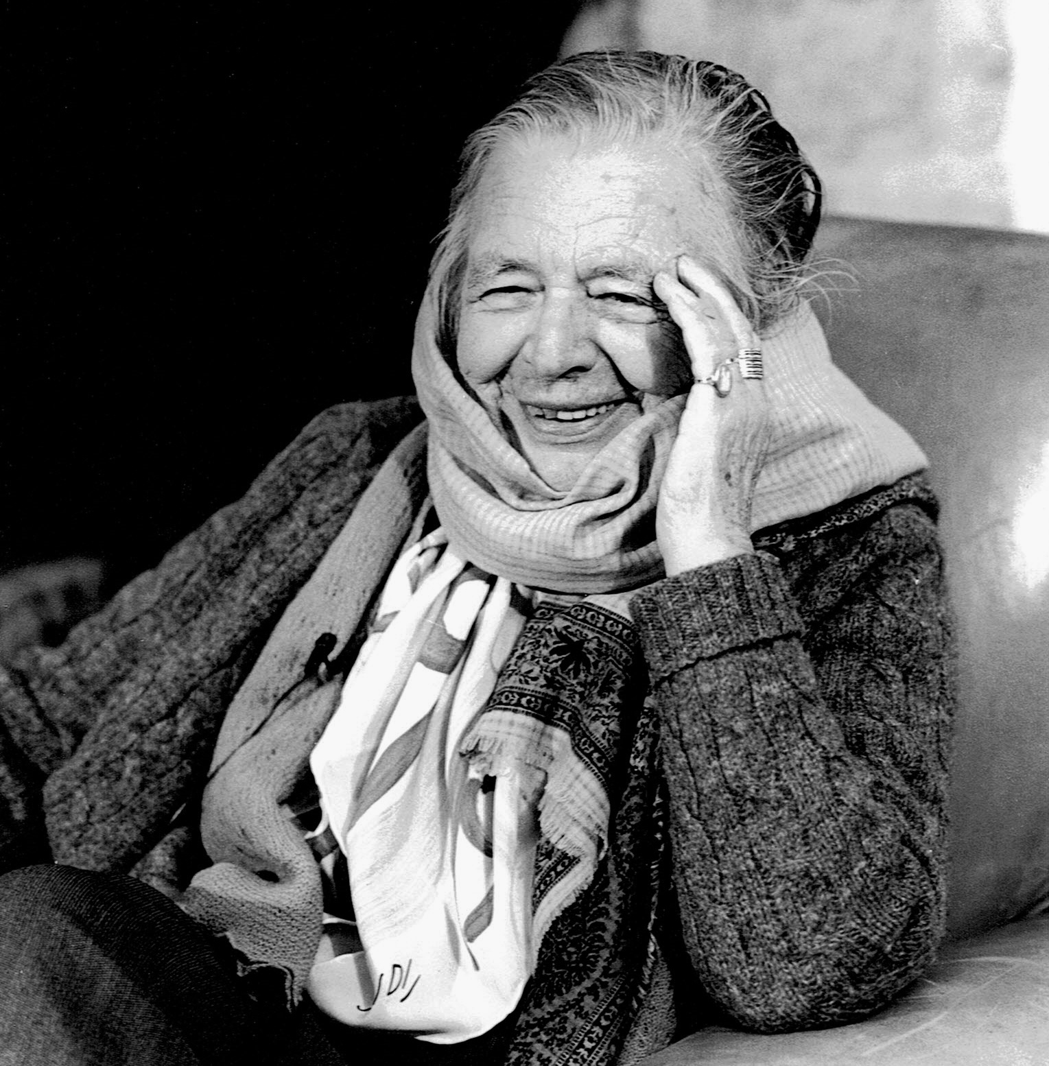 Marguerite Yourcenar (1903-1987) - foto De Grendel Bernhard in 1982 te Bailleul.jpg